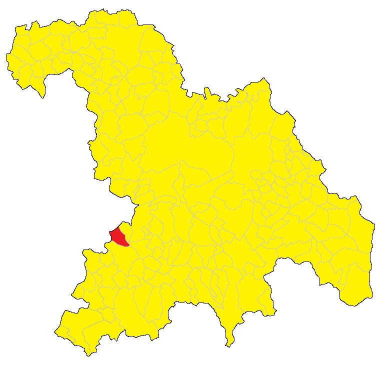 Mappa del comune di Alice Bel Colle (AL).